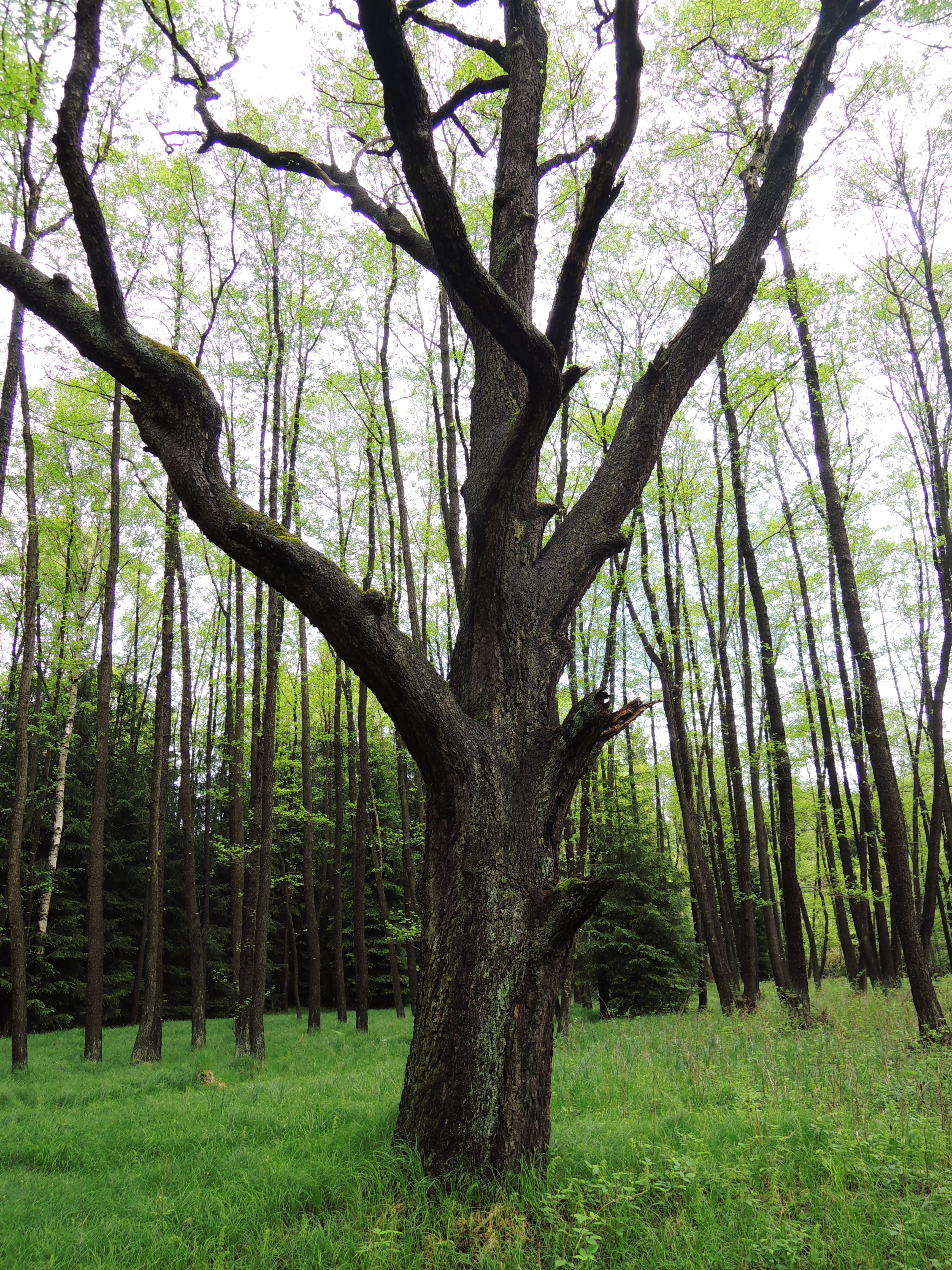 PR Prameny Klíčavy